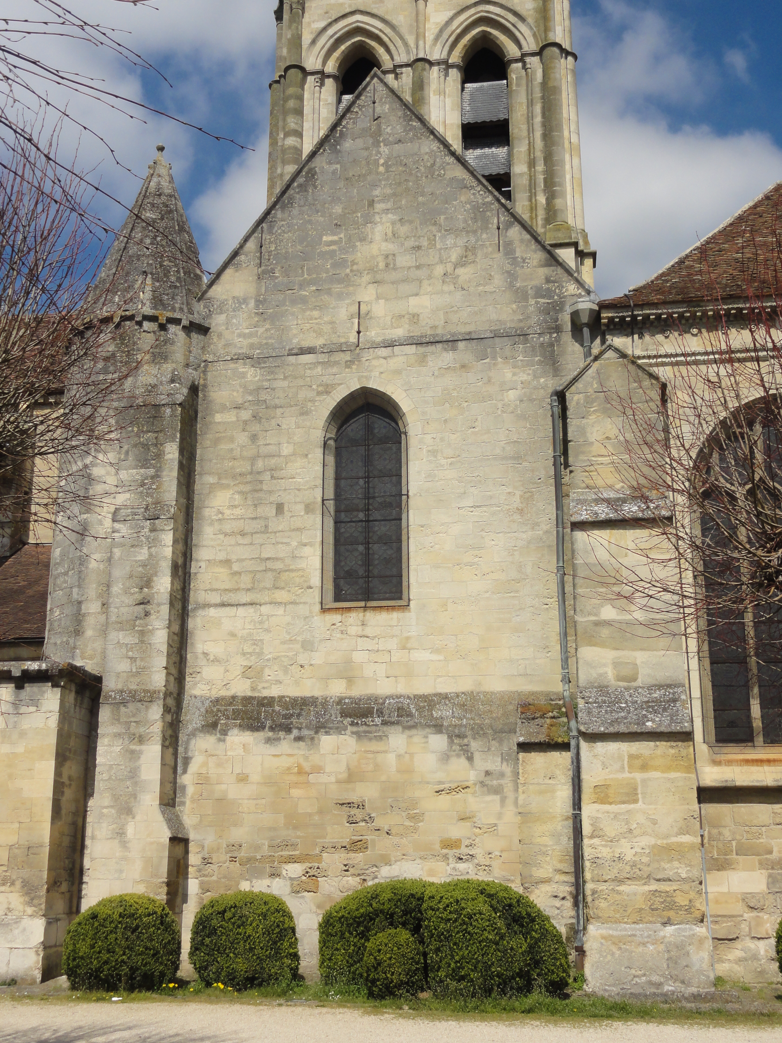 Église Notre-Dame-de-l'Assomption d'Auvers-sur-Oise - voir titre.